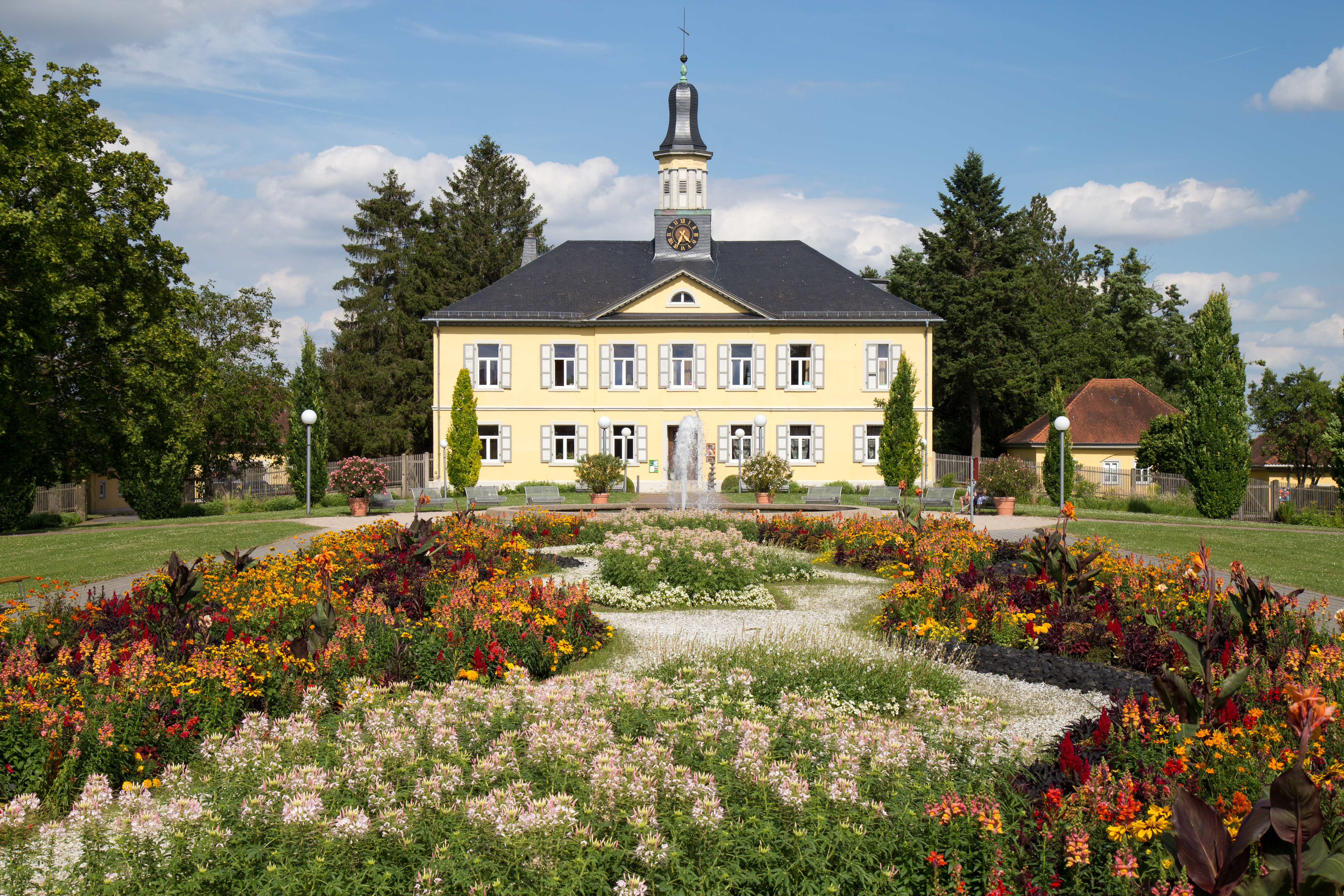 Ehemaliges Direktionsgebäude mit "Feuerbeet" im Salinengarten Bad Rappenau